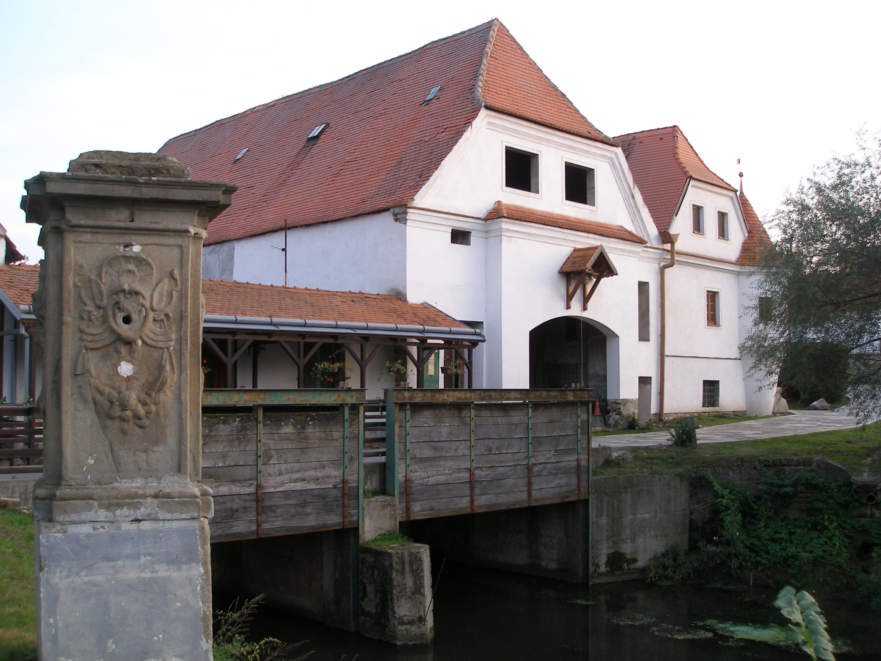 Vodní mlýn, Nejdek 17, Nejdek (Lednice).